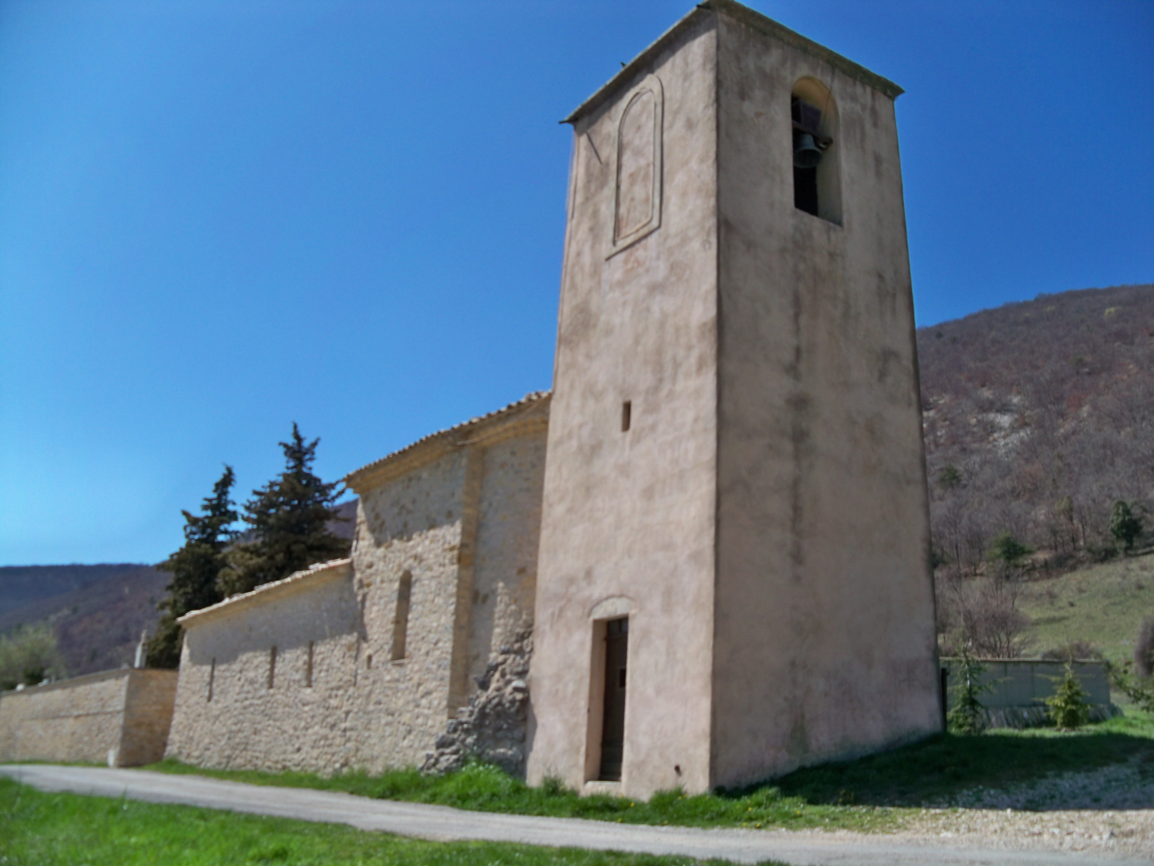 Chapelle de Jonquet, La Rochegiron (04)